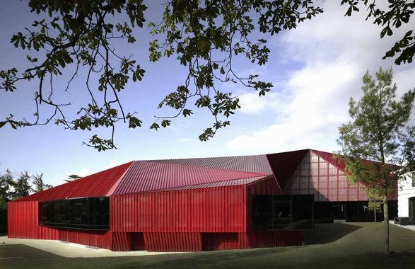 Rocher de Palmer